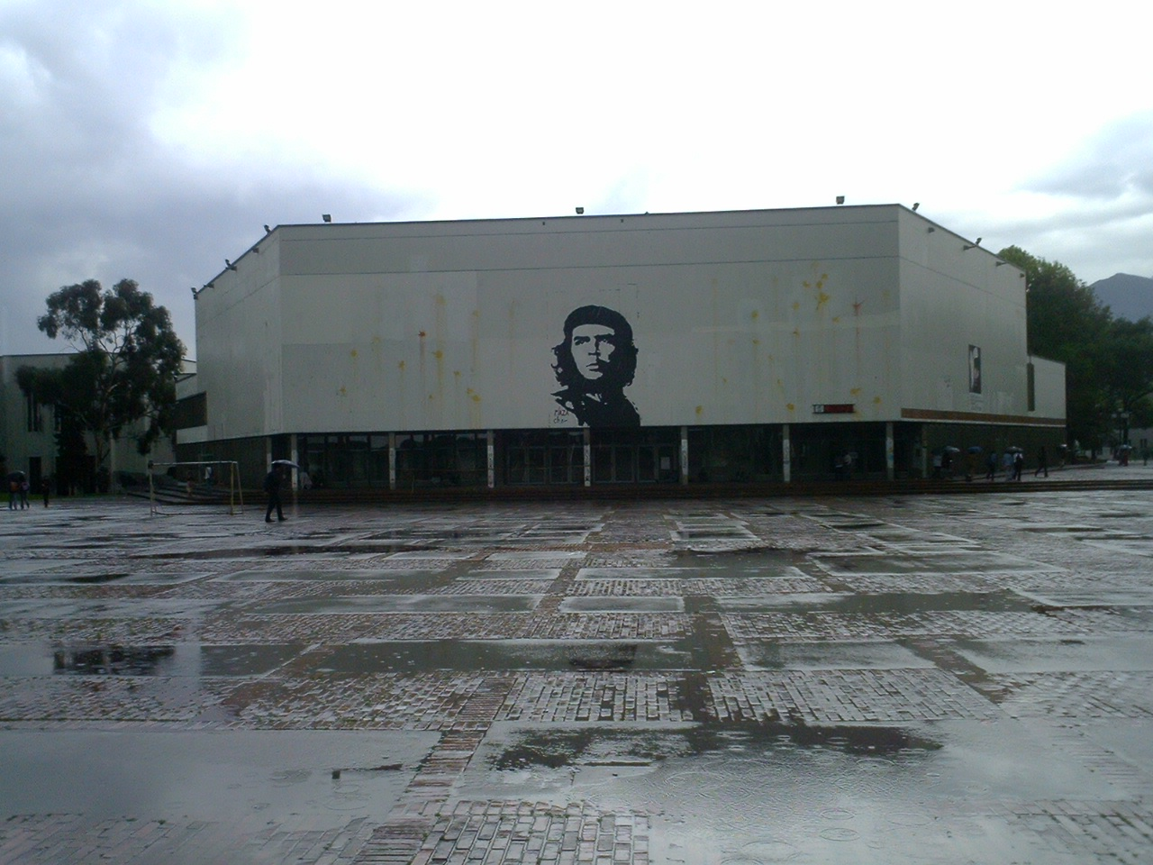 La plaza central de la ciudad universitaria, sede de la Universidad Nacional de Colombia en Bogotá.